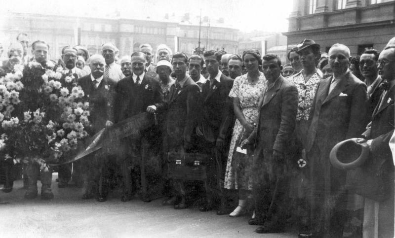 Grab des Unbekannten Soldaten in Warschau